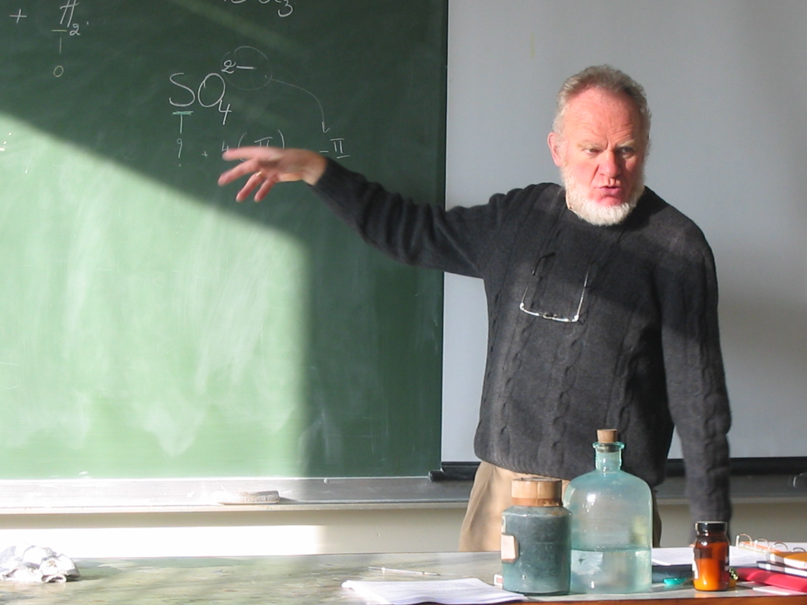 Edward Belmans in zijn labo